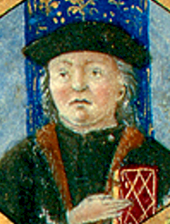 Antonio Bonfini mellképe, Philostratus kódex Bibliotheca Corviniana. Több figurális iniciáléval ellátott címlap található a kódexben. A kódex miniátorát korábban Attavante degli Attavanti személyében vélte feltalálni jó néhány kutató, ma egyöntetűen Boccardino il Vecchio firenzei mester munkájának tartják.